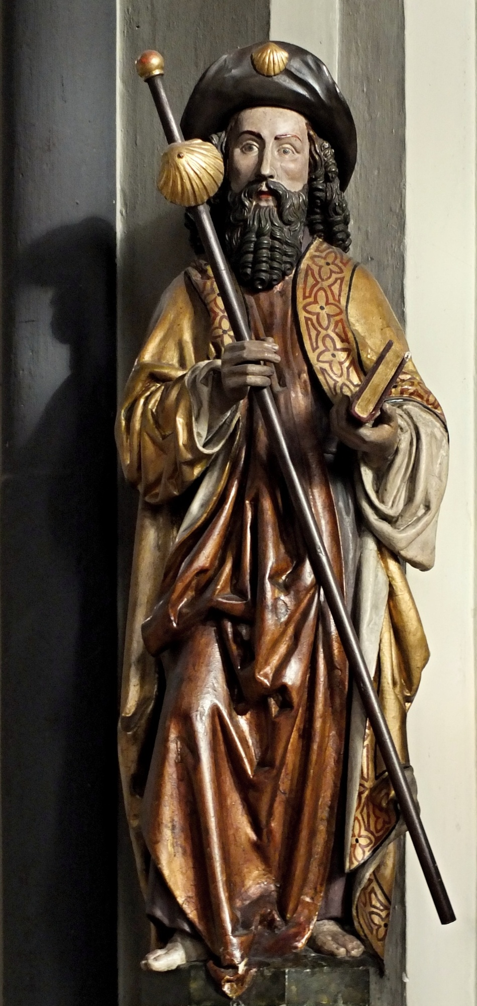 Status des St. Jacobus in der St. Jacobus Kirche, Hilden